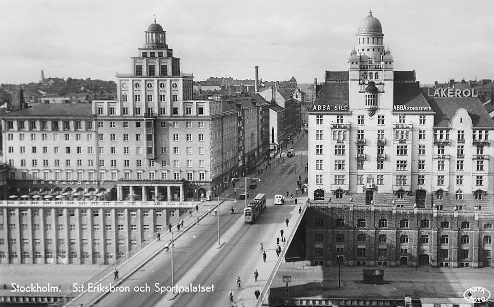 S:t Eriksbron med S:t Erikspalatset och Sportpalatset